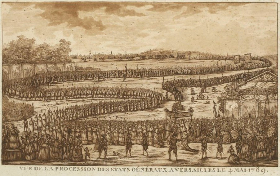 Procession Etats généraux à Versailles le 4 mai 1789, Musée de la Révolution française - Vizille